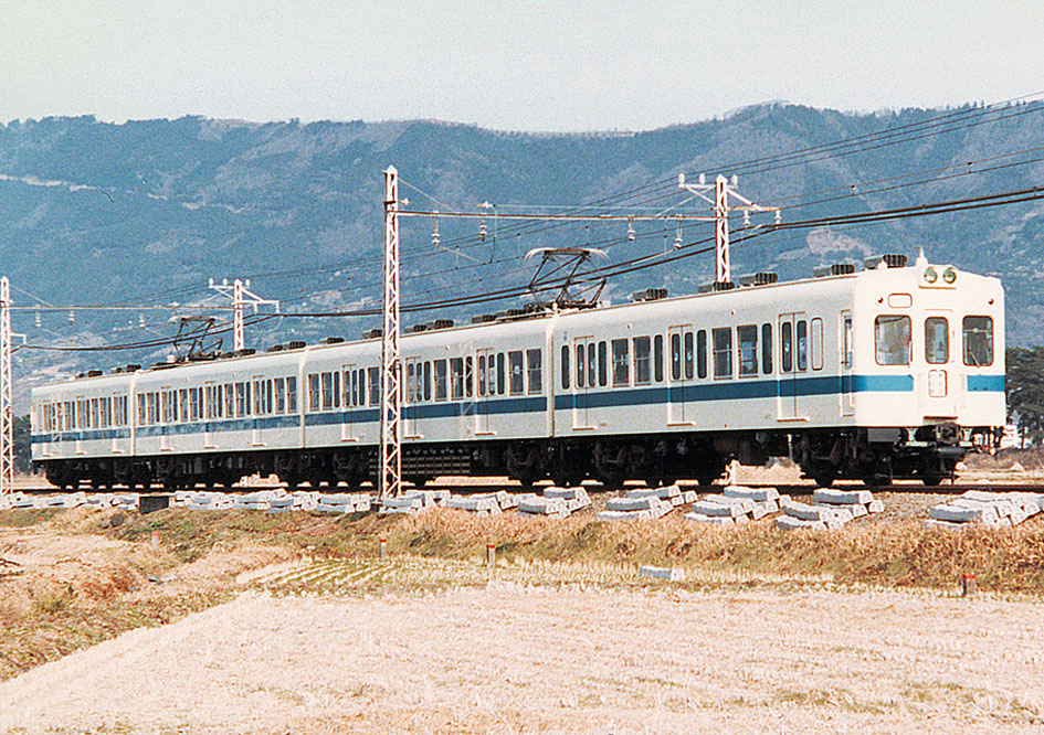 小田急電鉄 2400系